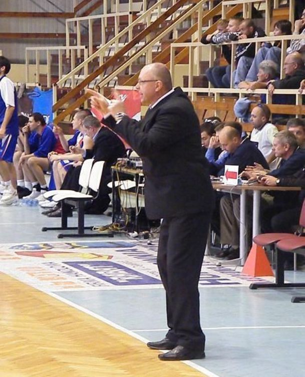 Trener Spójni Stargard Mieczysław Major (2009)